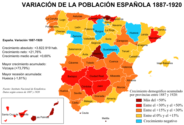 Mapa de España con las variaciones de población por provincias en el periodo 1887-1920, según los censos correspondientes del Instituto Nacional de Estadística.